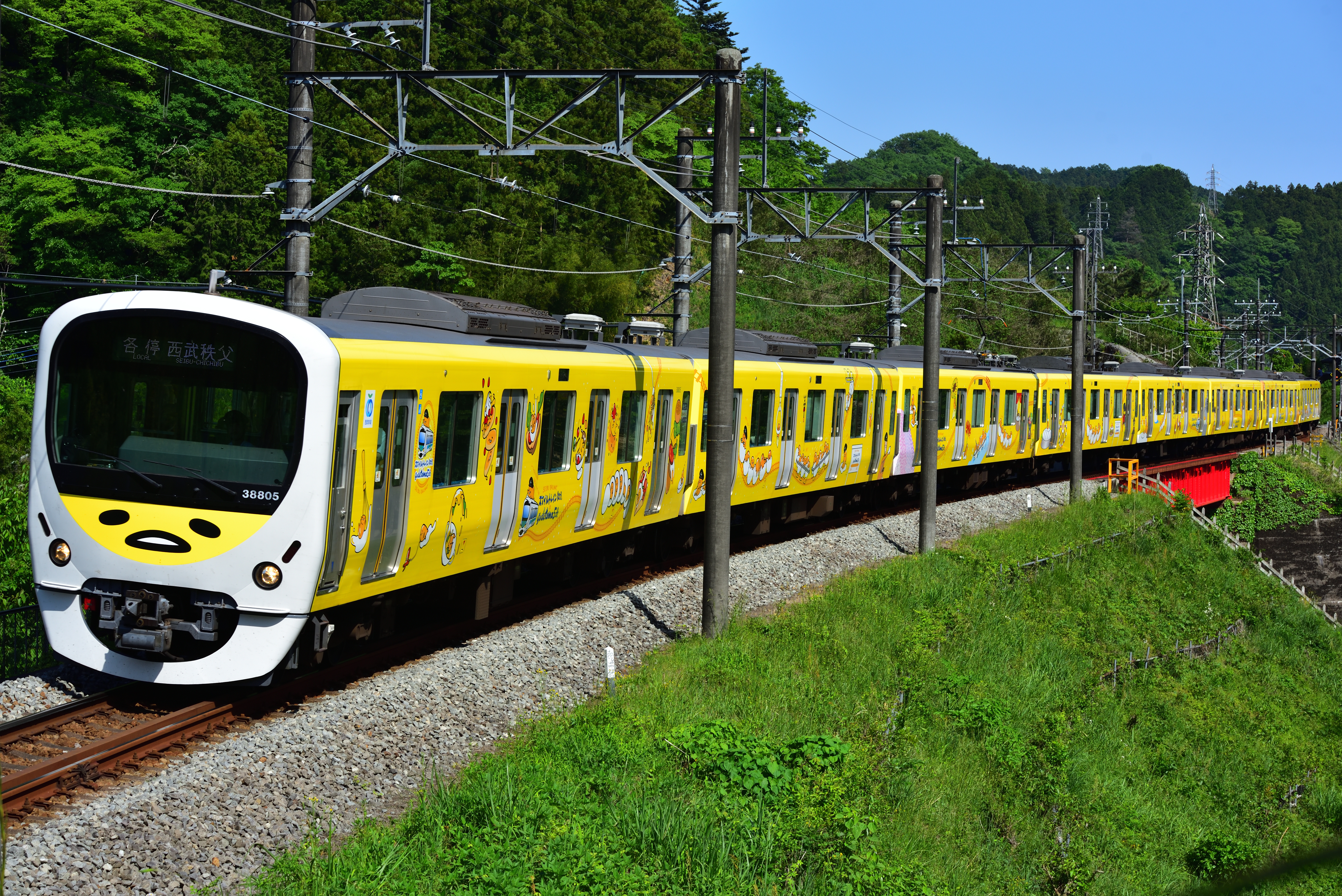 ぐでたまスマイルトレイン 30000系（38105F）池袋線 吾野～東吾野間 池袋方面（ぐでたま仕様） Nikon D750